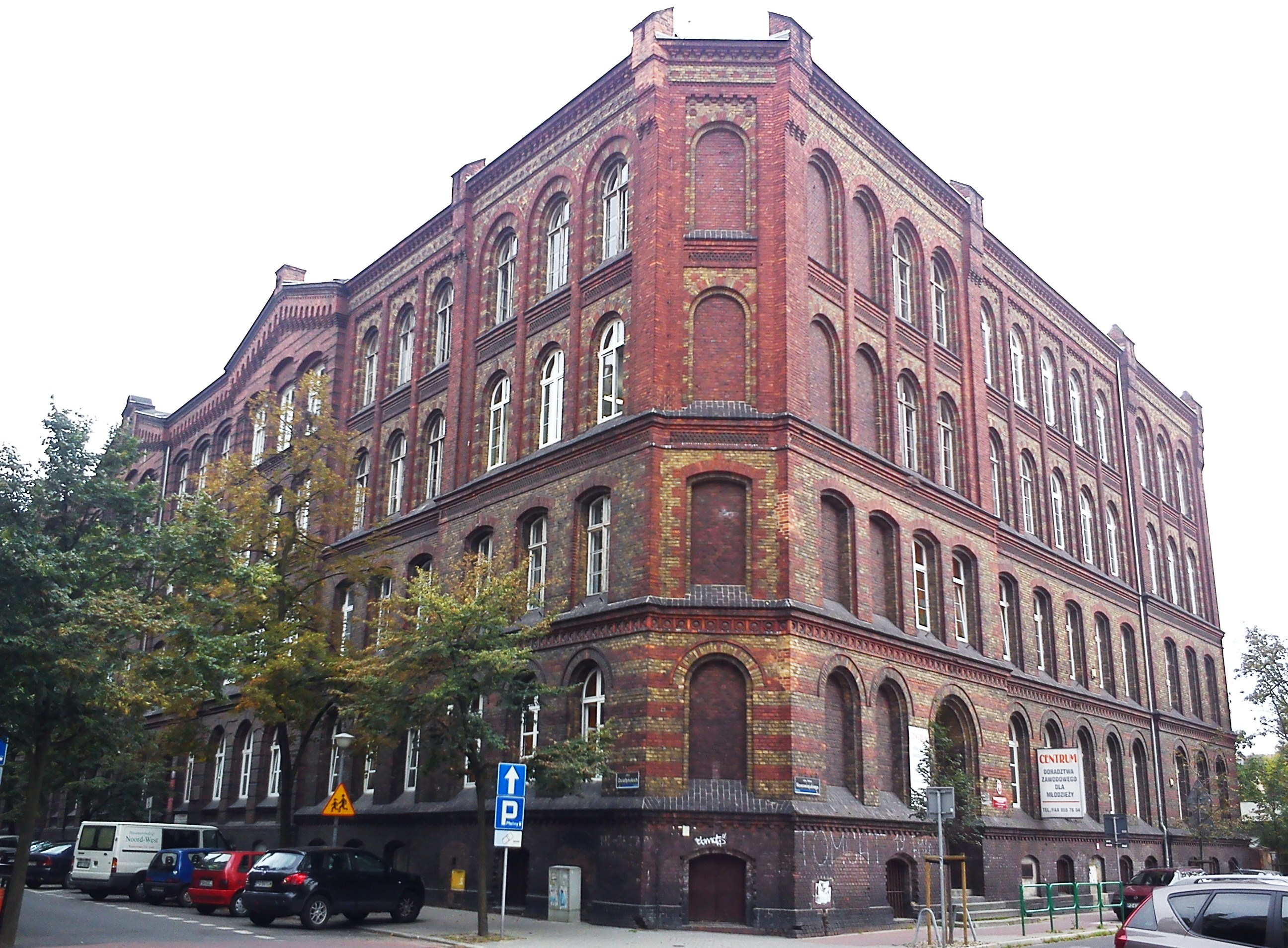 POznań, ul. Działyńskich 4/5 - dawna szkoła dla chłopców (zbud. 1884-85 rozb. 1889-90), obecnie Zespół Szkół Zawodowych nr 6